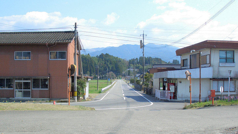 くま川鉄道湯前線ja:一武駅 駅前 駅前広場から南側を見る。 写真中央の道はja:熊本県道262号覚井一武線。奥へ進むとja:国道219号と交差し、熊本県道43号錦湯前線に突き当たる。 撮影者/著者/著作権保有者 : MK Products (本人がアップロード) 撮影日 : 2007/03/14 一武駅用にアップロードした画像です。良い画像があれば別の画像に変えてください。